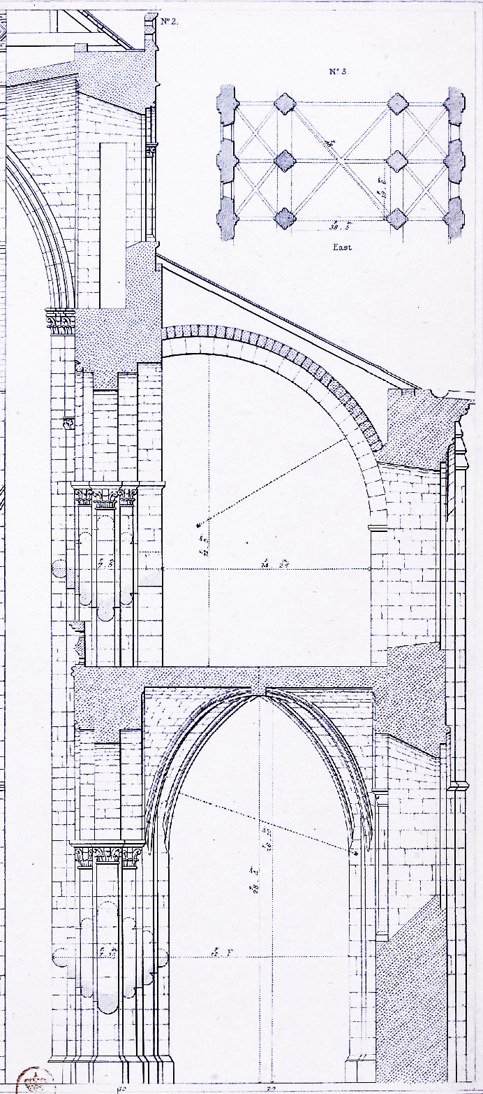 Caen église Saint-Etienne, coupe (image du domaine public modifiée, John Britton)